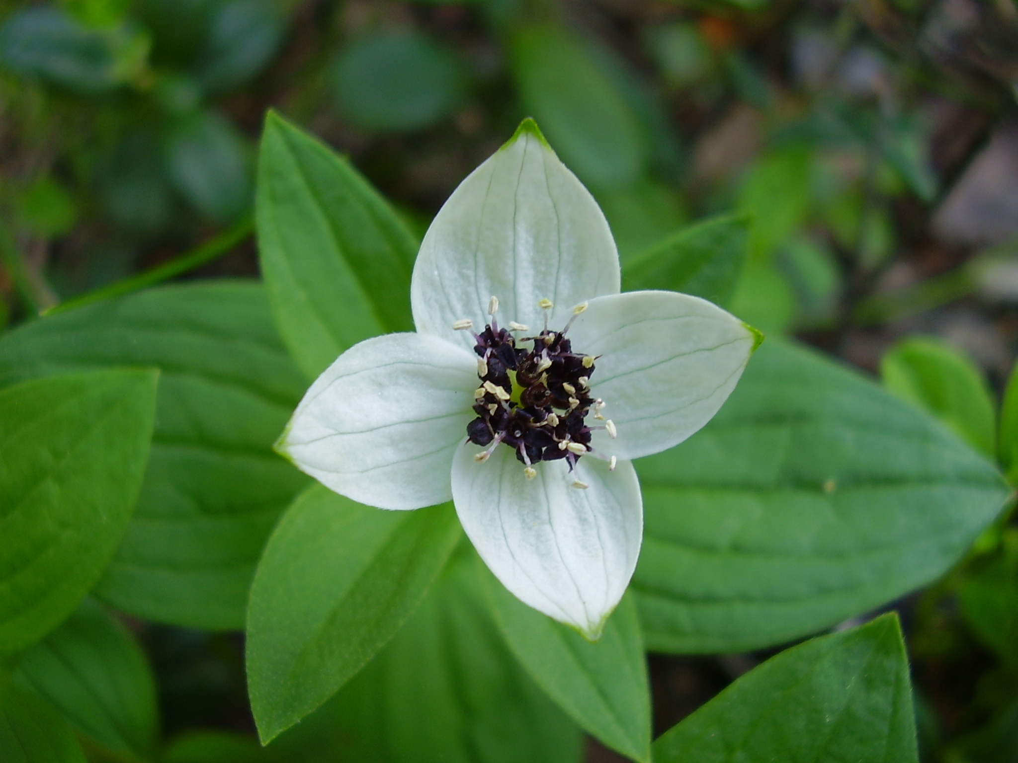 Cornus suesica